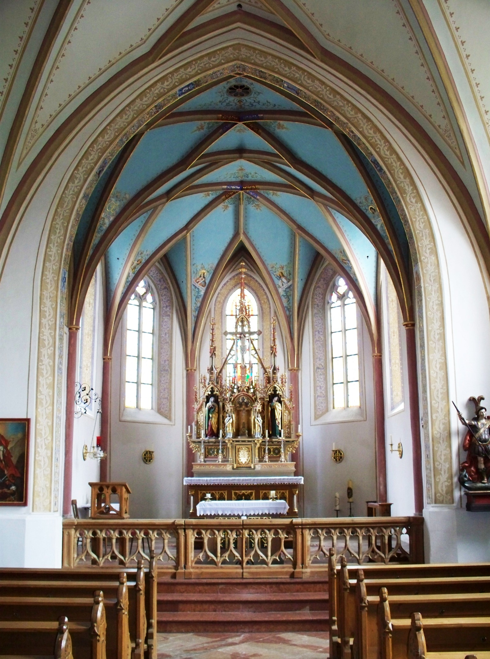 Die Friedhofskirche St. Michael in Bad Griesbach im Rottal von innen.